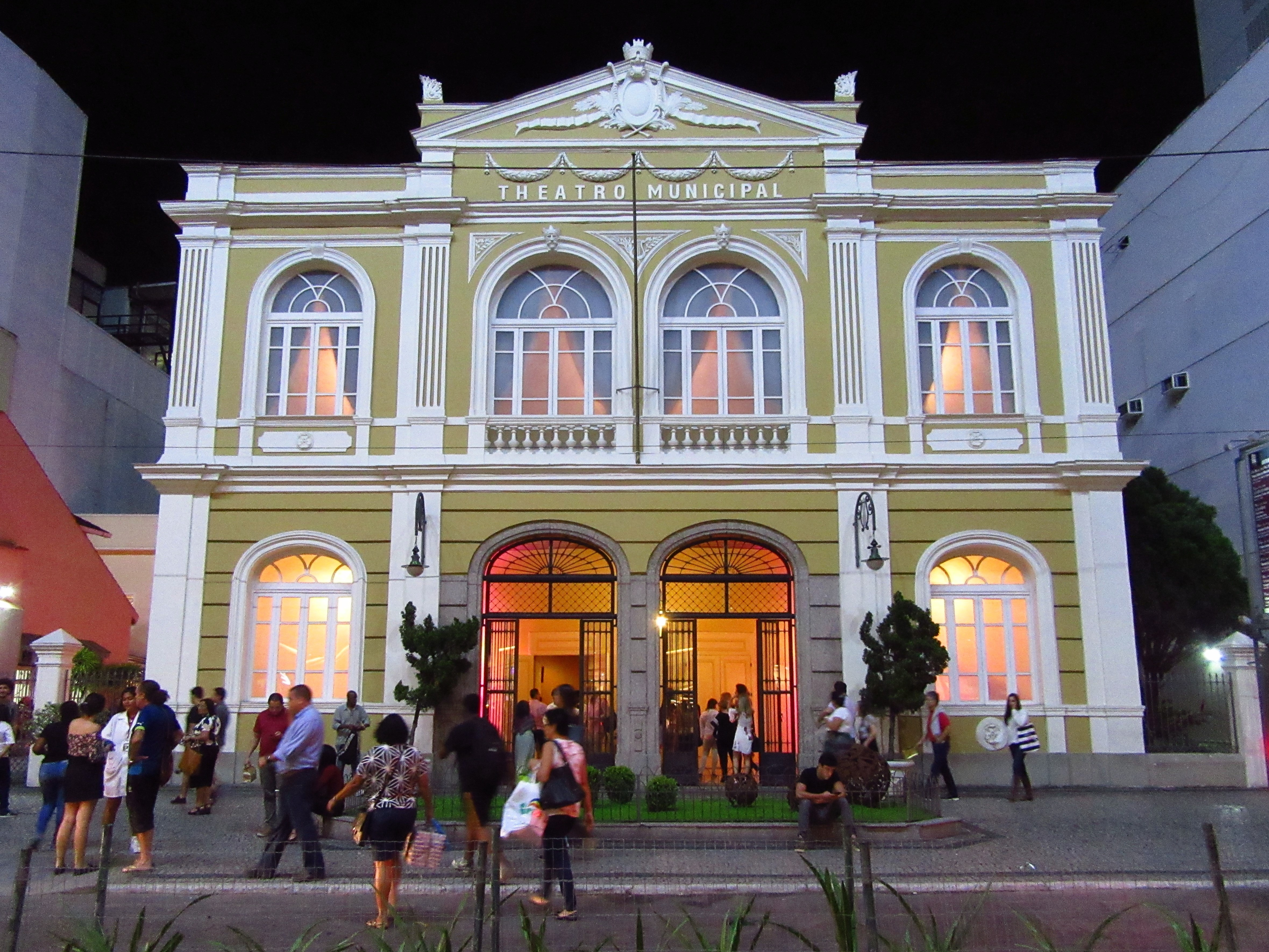 Fachada del Teatro Municipal de Nitéroi